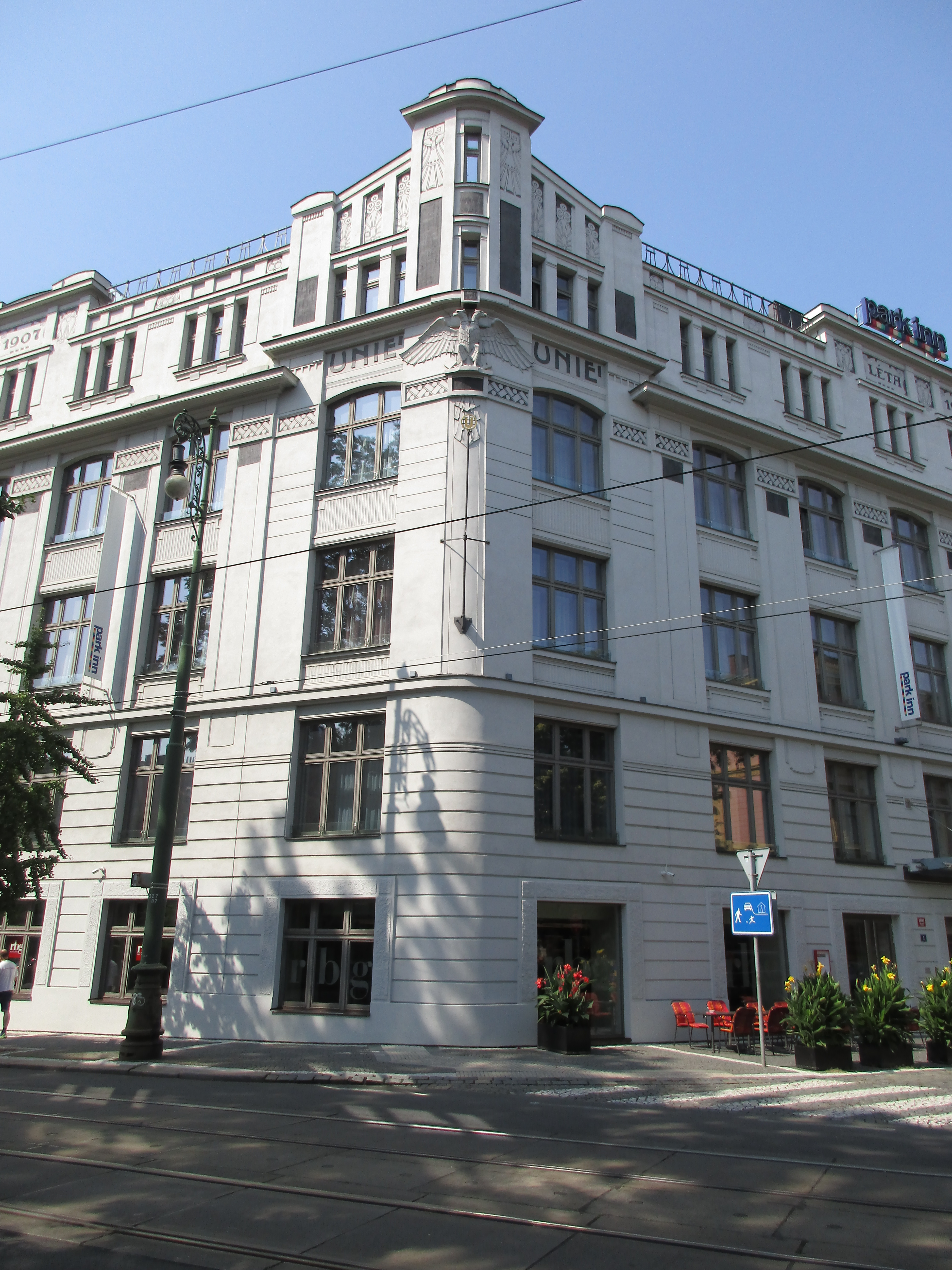 Česká grafická unie.